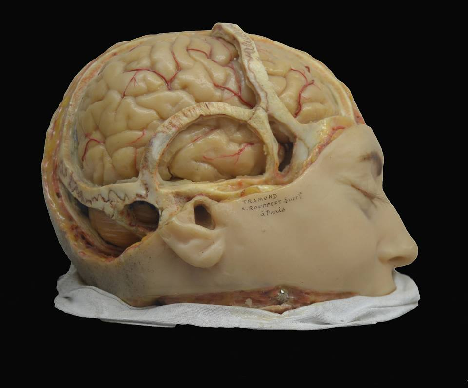 Modelo en cera de cerebro humano. Casa parisina Tramond, último tercio del siglo XIX. Col. de Ciencias Biomédicas del MUVa